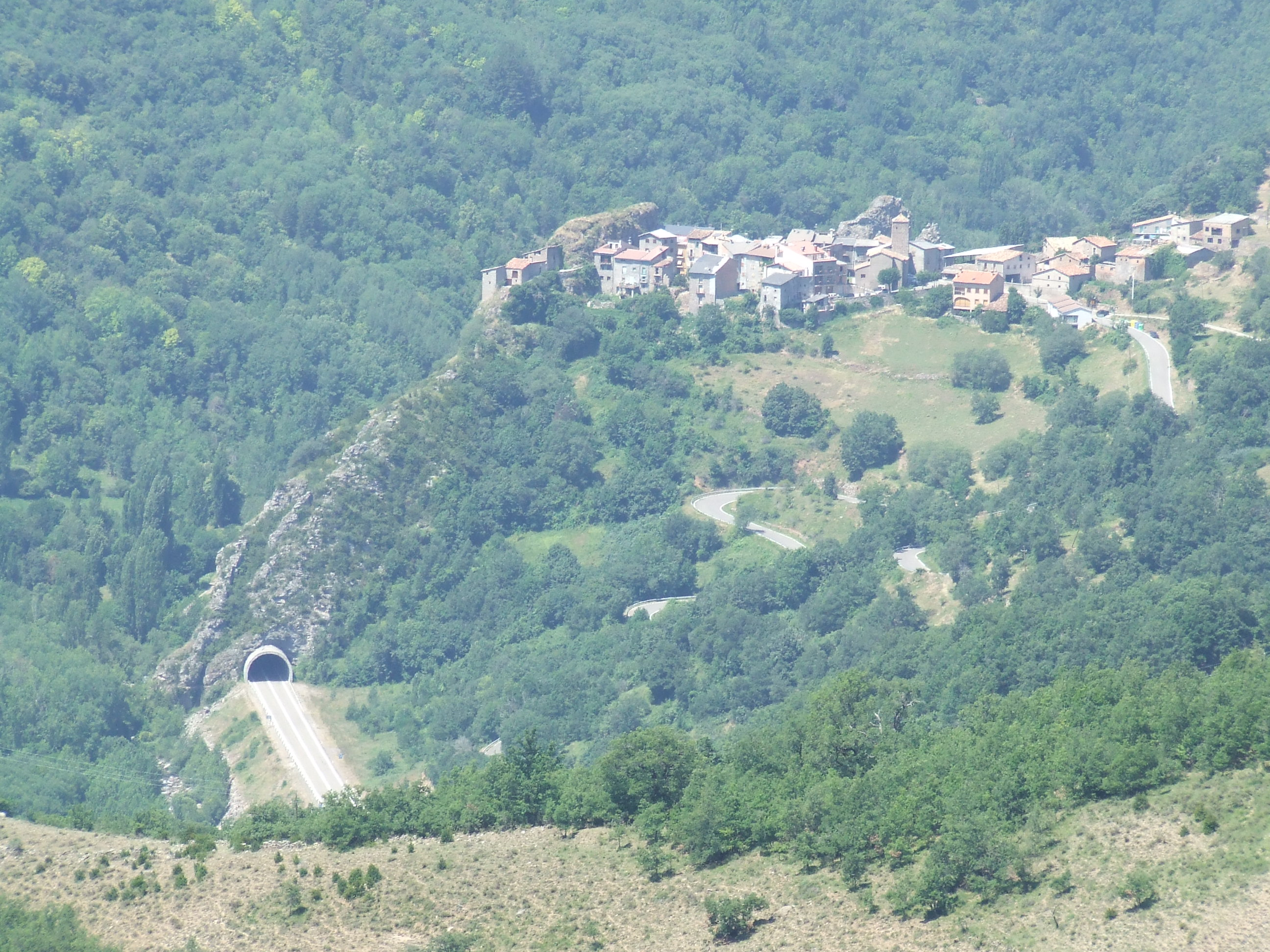 El poble de Sarroca de Bellera, dalt del penyal (Pallars Jussà)